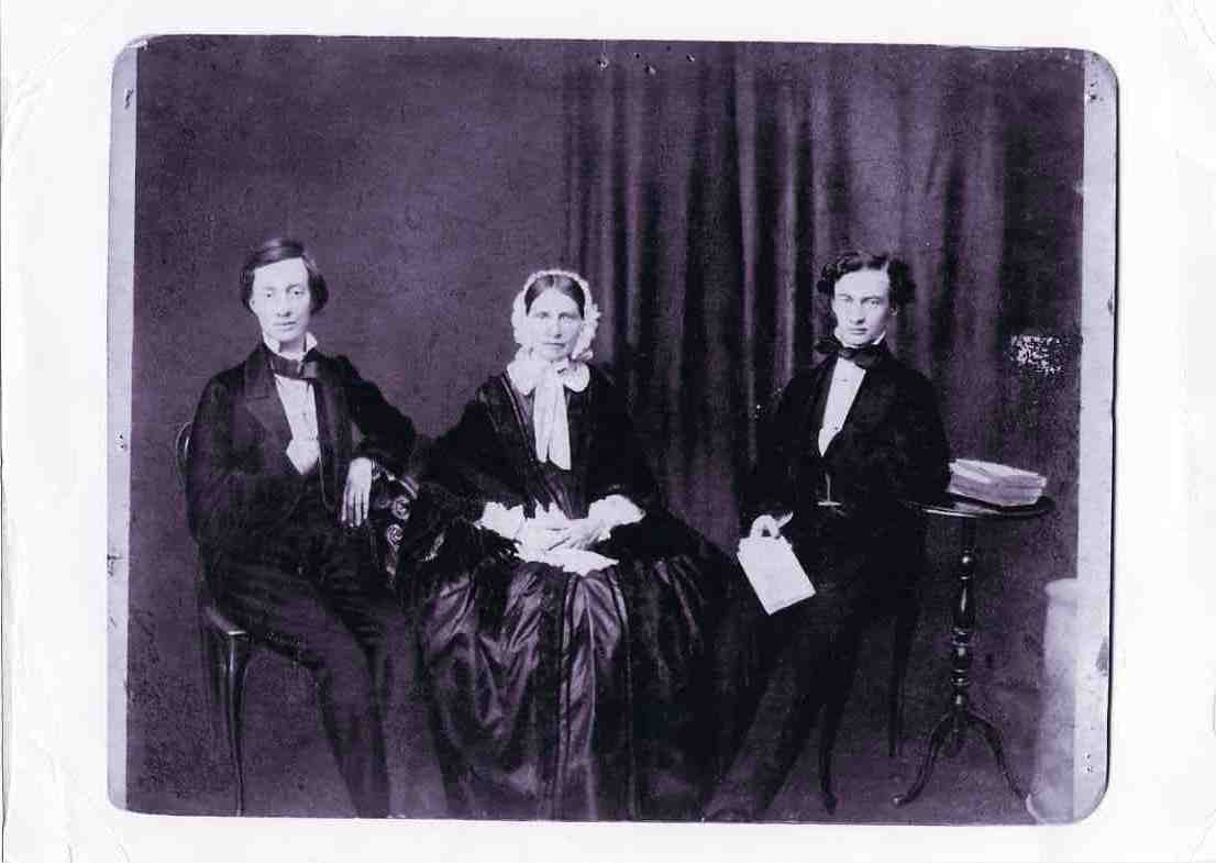 Семья Шперк. Харьков, 1860-е годы. автор - неизвестен.